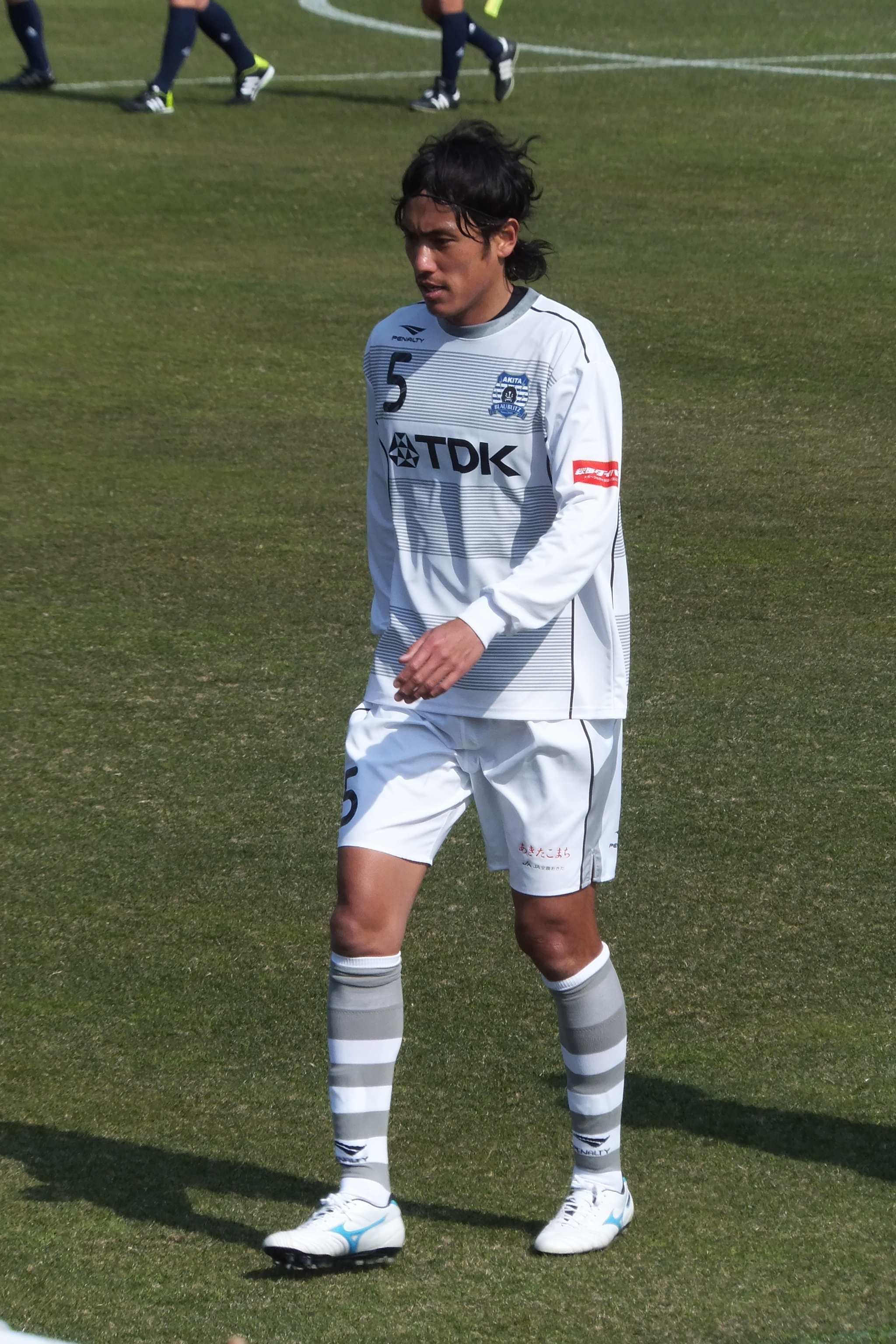 ブラウブリッツ秋田、#5 初田真也（DF）。2014年3月9日、J3リーグ開幕戦、YSCC対ブラウブリッツ秋田戦（ニッパツ三ツ沢球技場）にて。